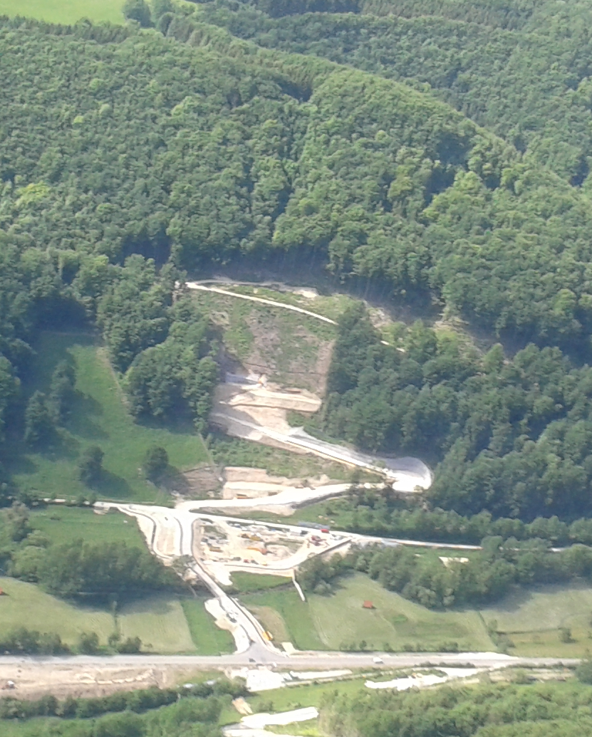 Boßlertunnel bei Wiesensteig für die Neubaustrecke Stuttgart Ulm vor dem Durchstich